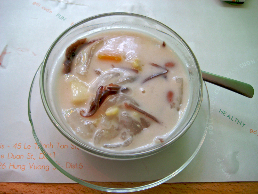 Chè khoai môn.